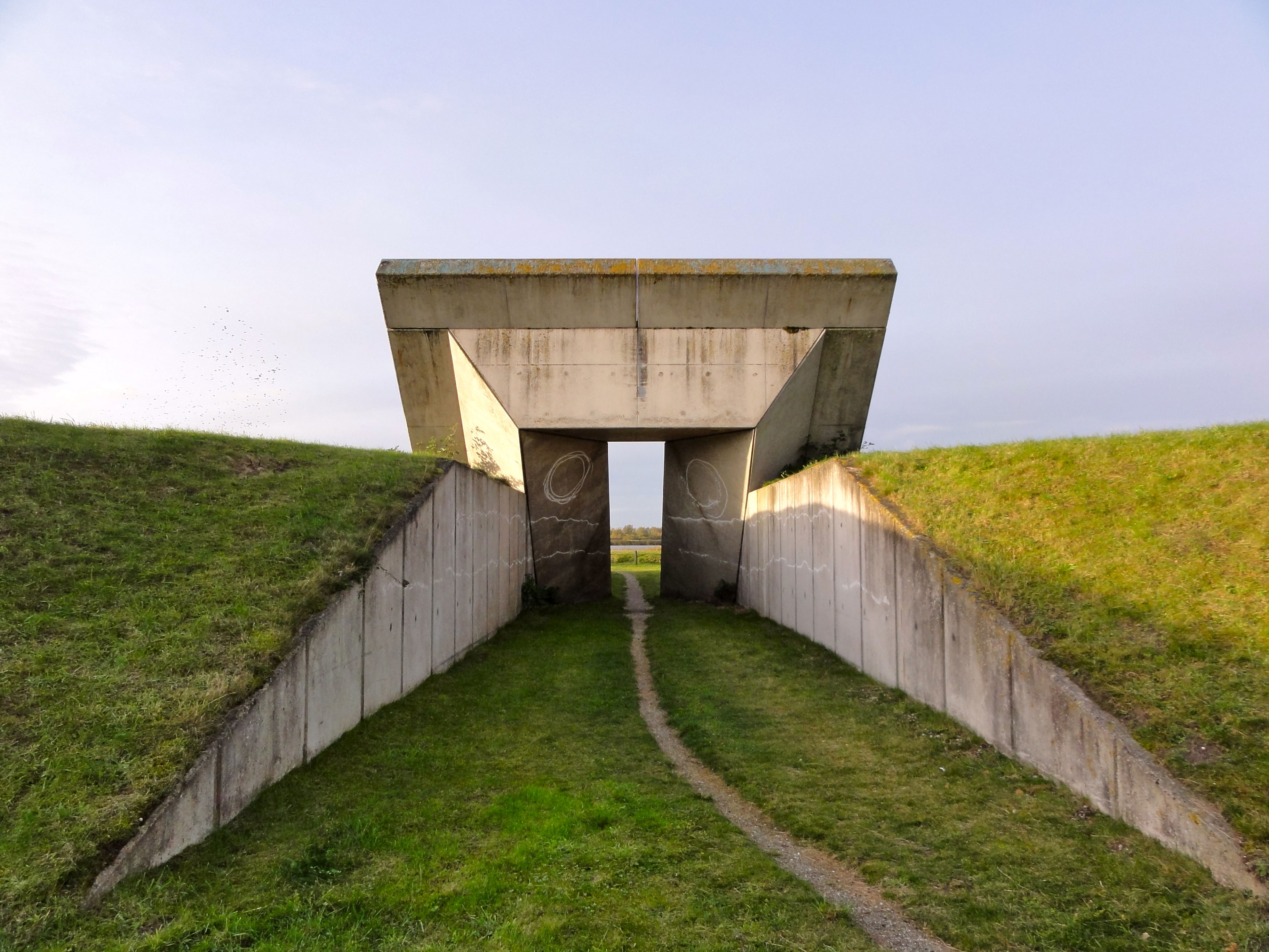 De Poort nabij Lauwersoog 1996 door Onco Tattje